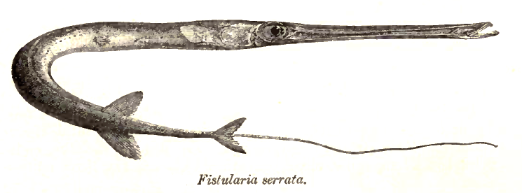 Fistularia serrata = Fistularia petimba Lacepède, 1803